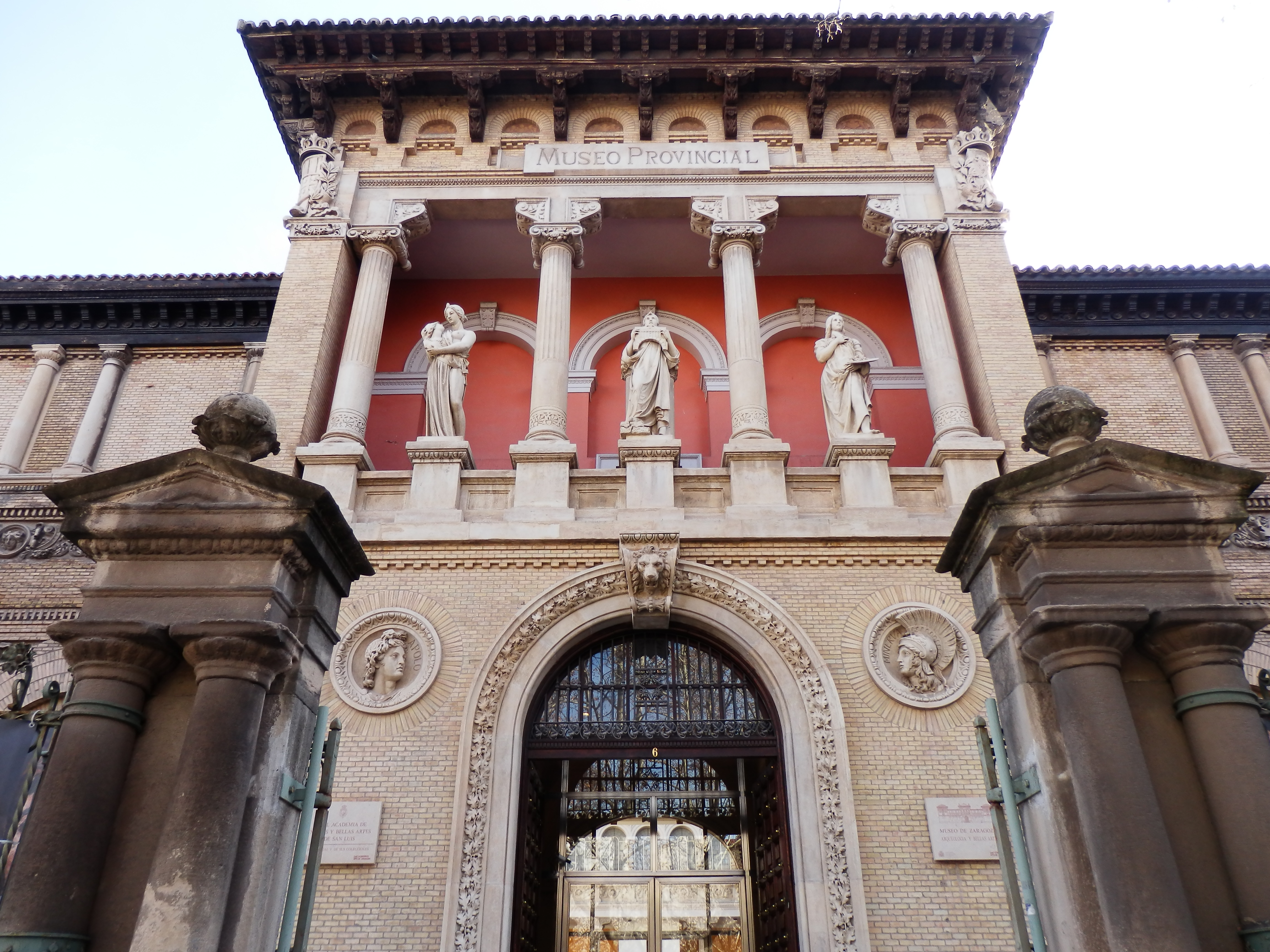 Museo Provincial de Zaragoza